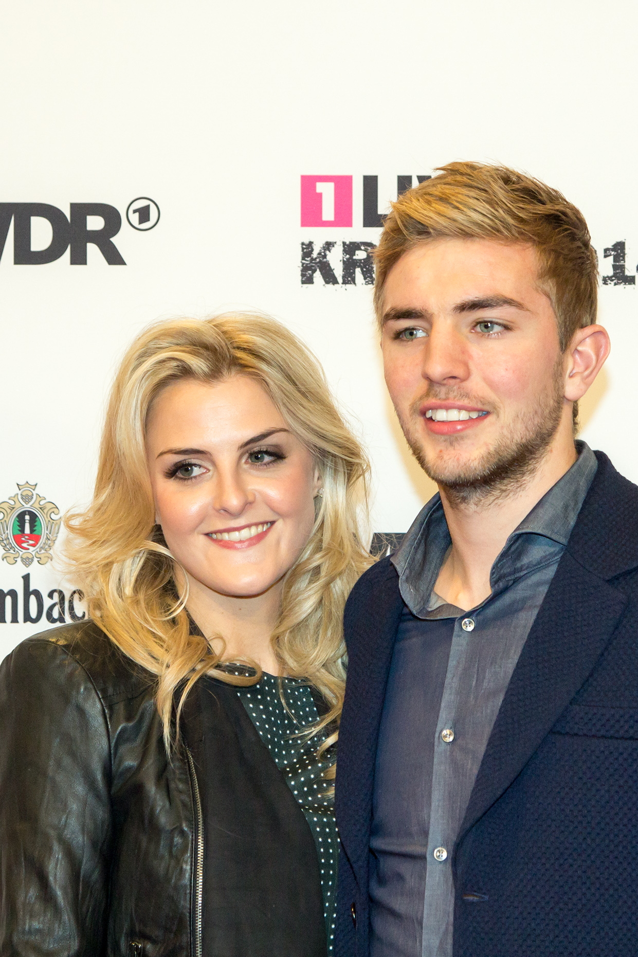 1LIVE Krone 2014 in der Bochumer Jahrhunderthalle:Christoph Kramer und Freundlin Celine